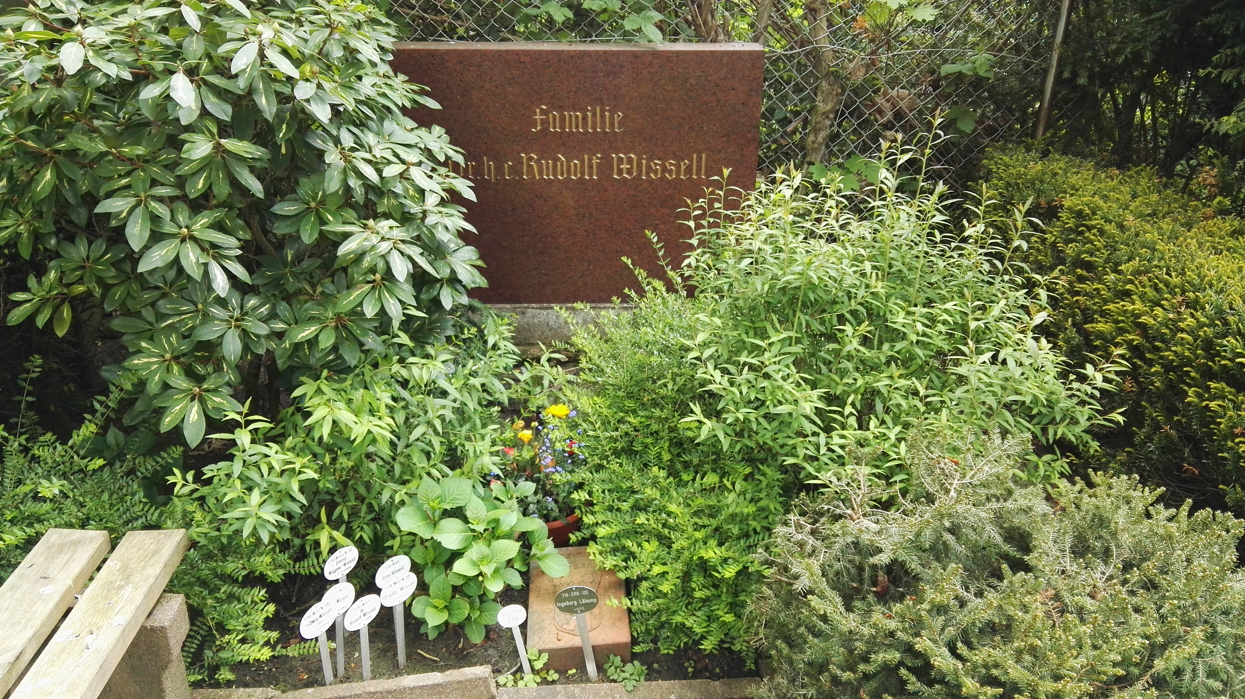 Grab von Rudolf Wissell auf dem Heilig-Kreuz-Kirchhof in Berlin; Ehrengrab